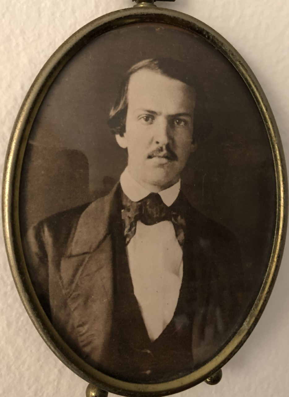 Foto a partir de un daguerrotipo de Miguel Arroyo Hurtado